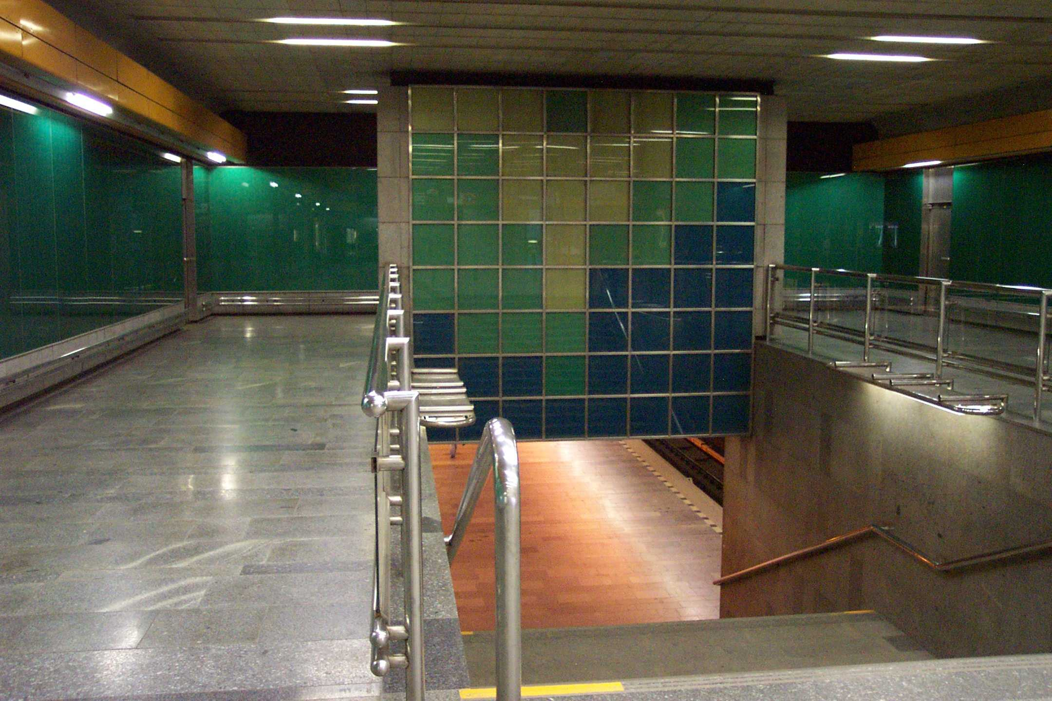 Metro station Radlická in Prague, enterance - Vstup do stanice metra Radlická v Praze